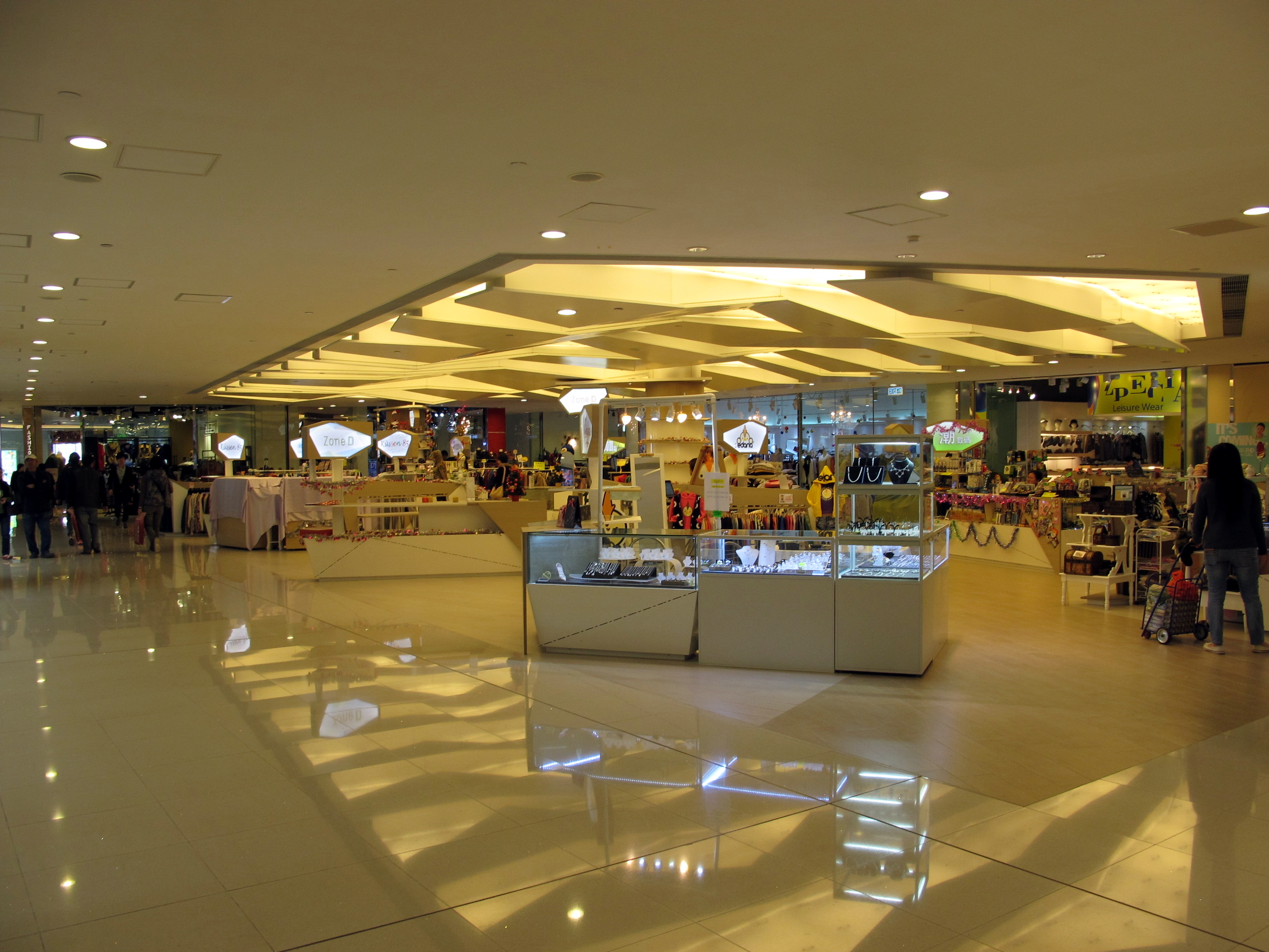 Domain mall Level 2 Small Retail Zone